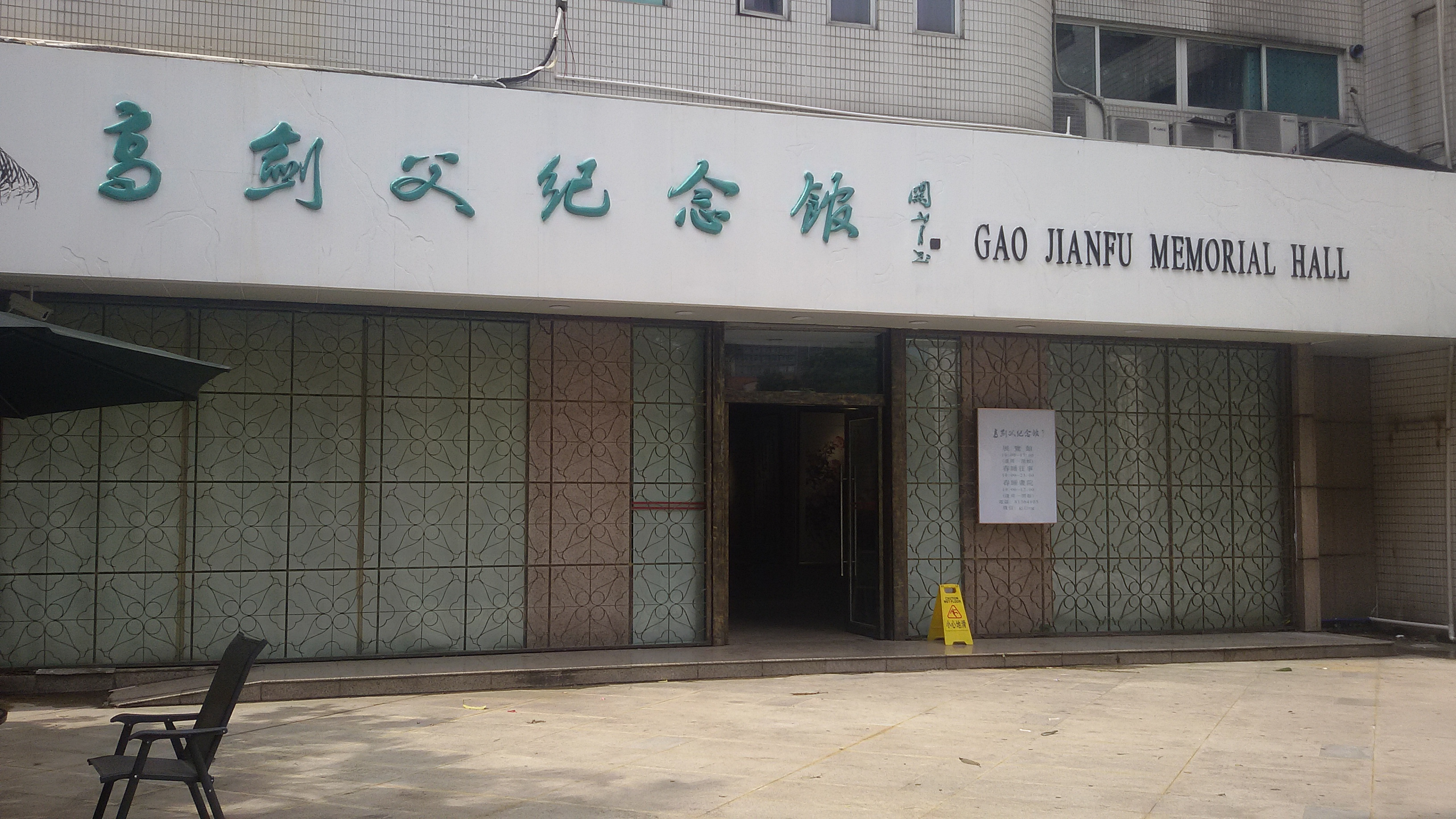 粵語: 高劍父紀念館